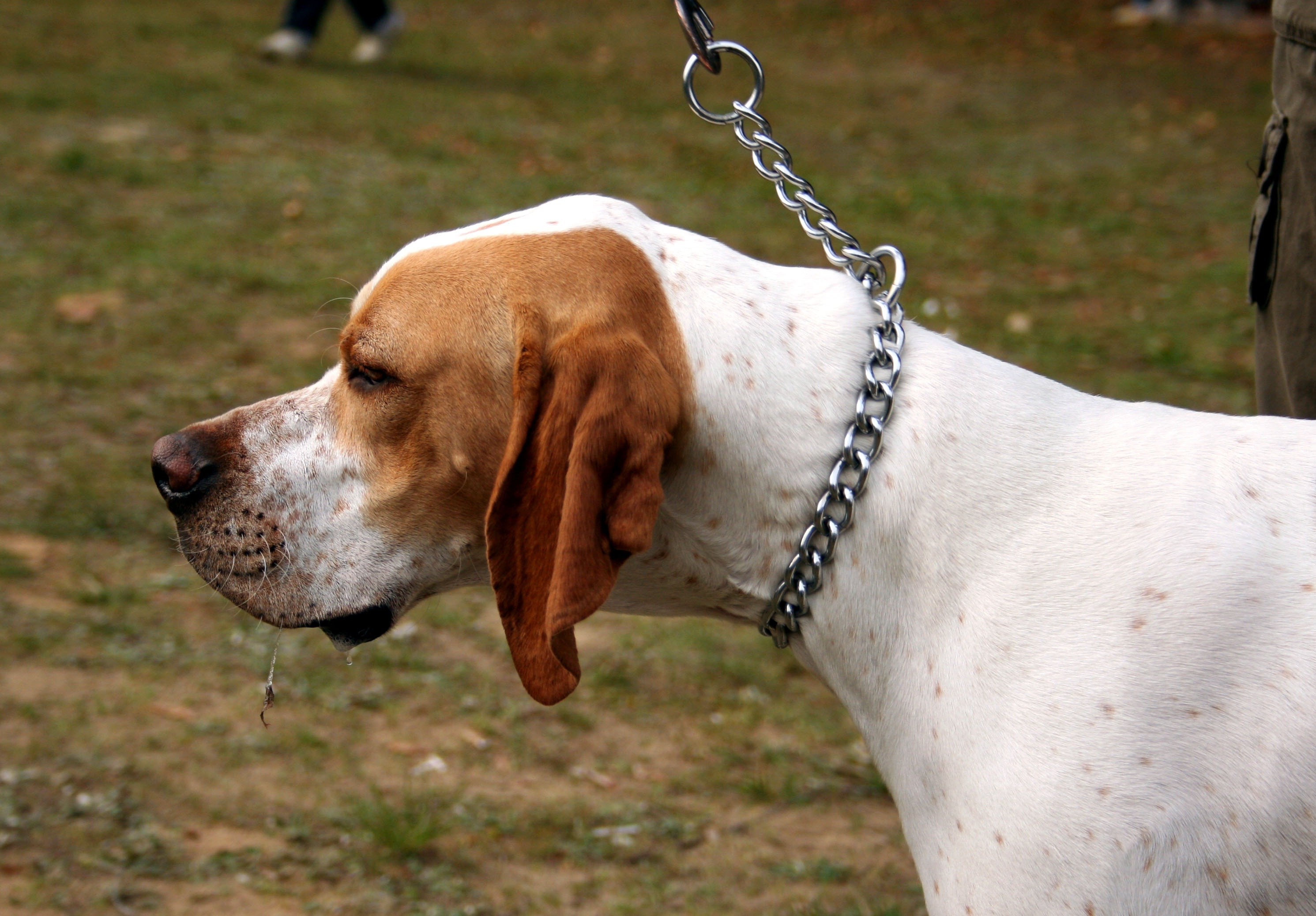 Pointer